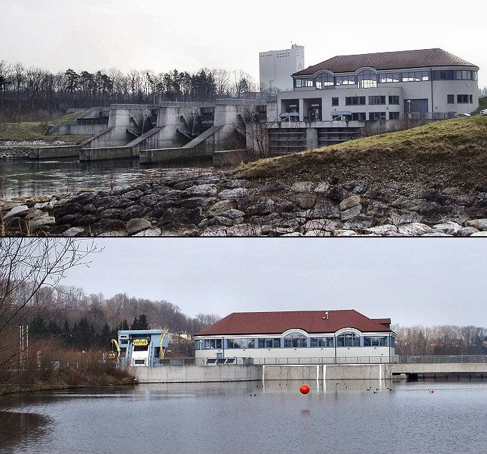 Kraftwerk Lambach